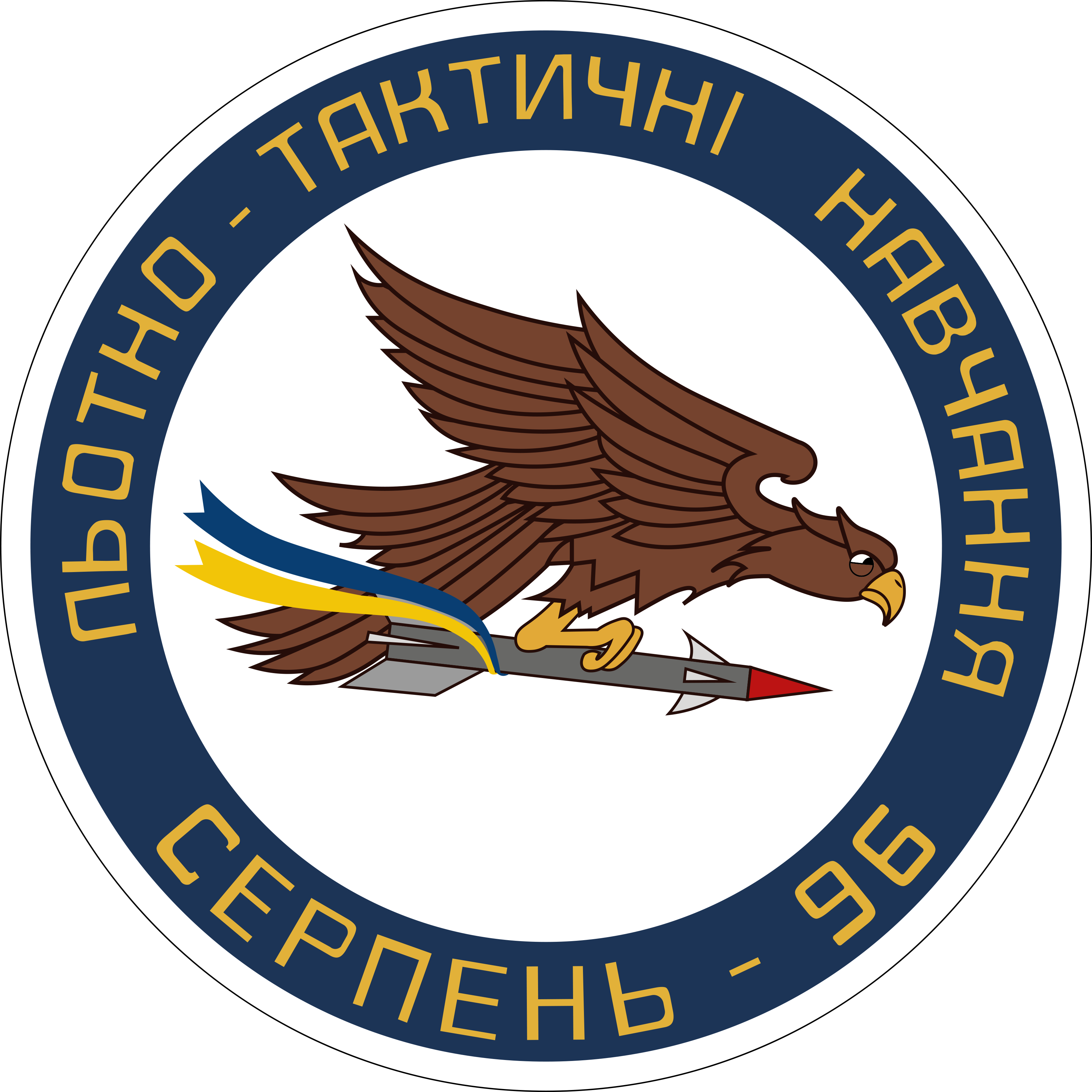 Льотно-тактичні навчання Серпень-96 — вперше в історії Військово-Повітряних Сил України велике показове льотно-тактичне навчання, відбулось у серпні 1996 року на полігоні «Київський — Олександрівський», Миколаївська область. Основною метою навчань було відпрацювання бойових дій бомбардувального авіаполку по аеродромам противника. Головна роль відводилась Су-24 7-го БАП зі Староконстантинова. Задачі прориву ПВО виконували Су-25, а прикриття Су-27 з 831-ша бригада тактичної авіації.